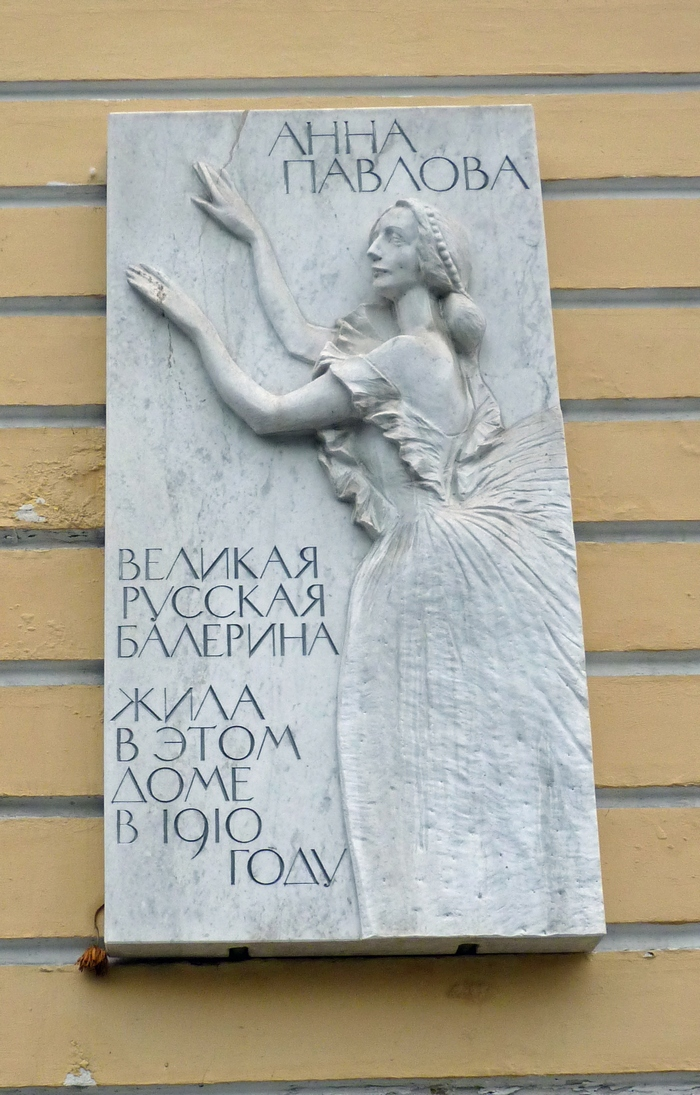 Plaque commémorative à St Petersbourg (2015)